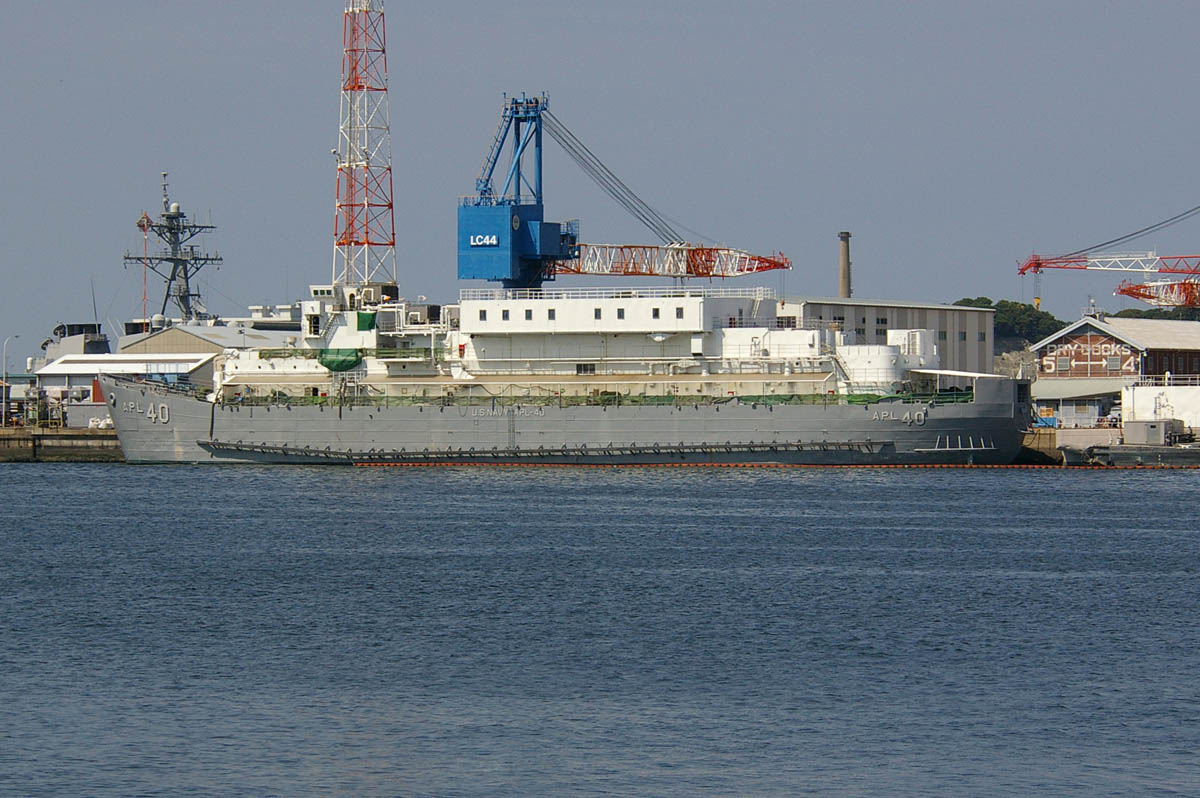 USS APL-40 Yokosuka,Japan